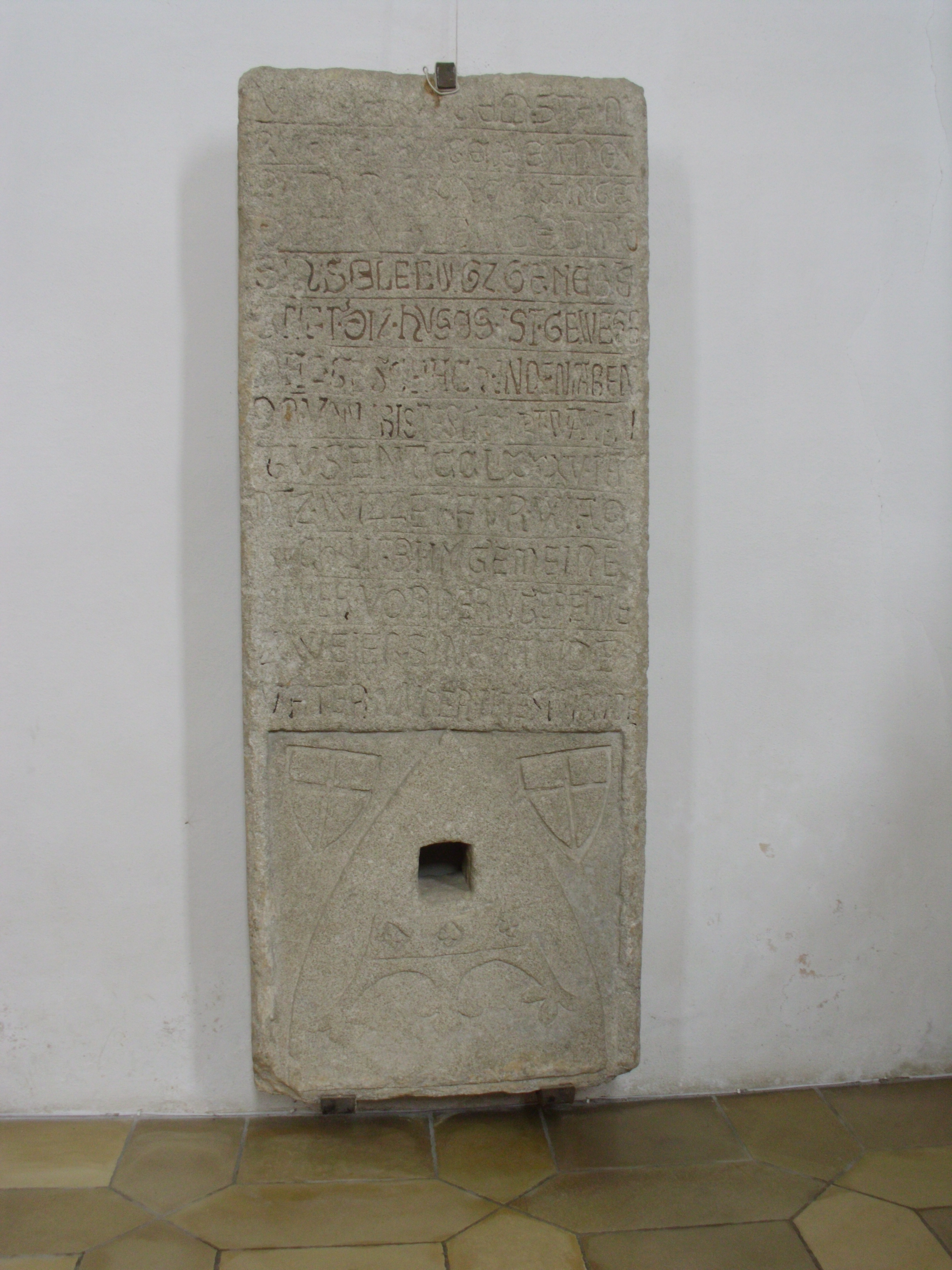 Obermässing, Gemeindeteil von Greding im mittelfränkischen Landkreis Roth, Kath. Pfarrkirche "Mariä Himmelfahrt", Grabplatte des Berthold von Mässingen (13. Jahrhundert)